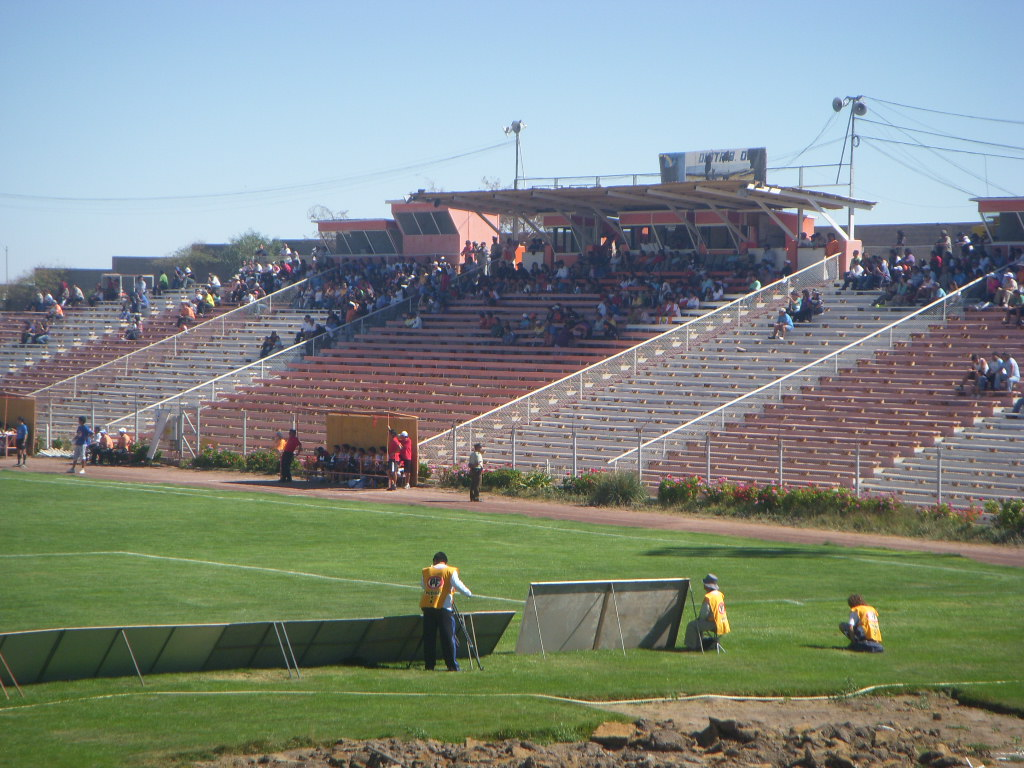 Estadio El Cobre de El Salvador, Chile